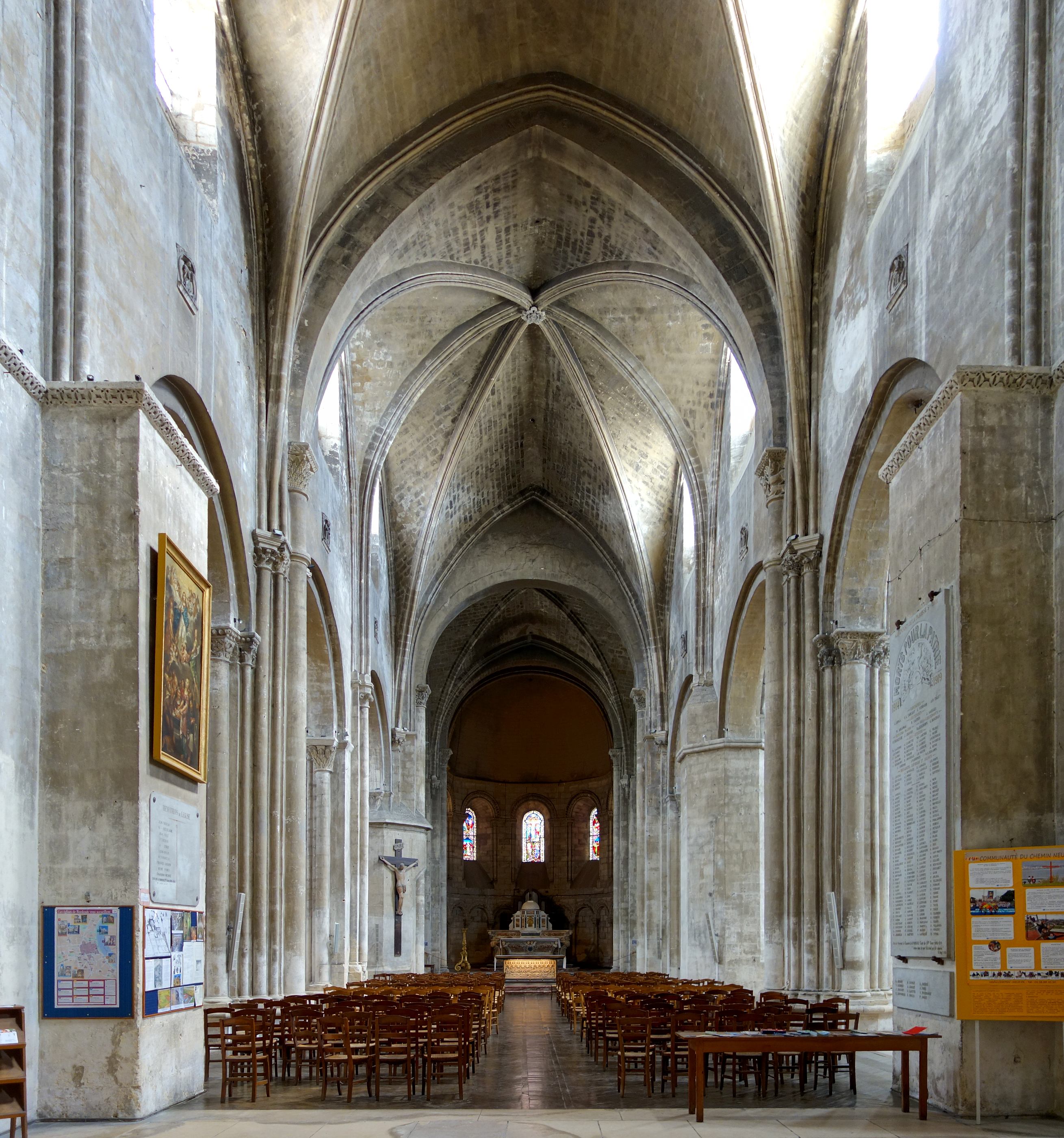 La nef de l'Église Sainte-Croix de Bordeaux.